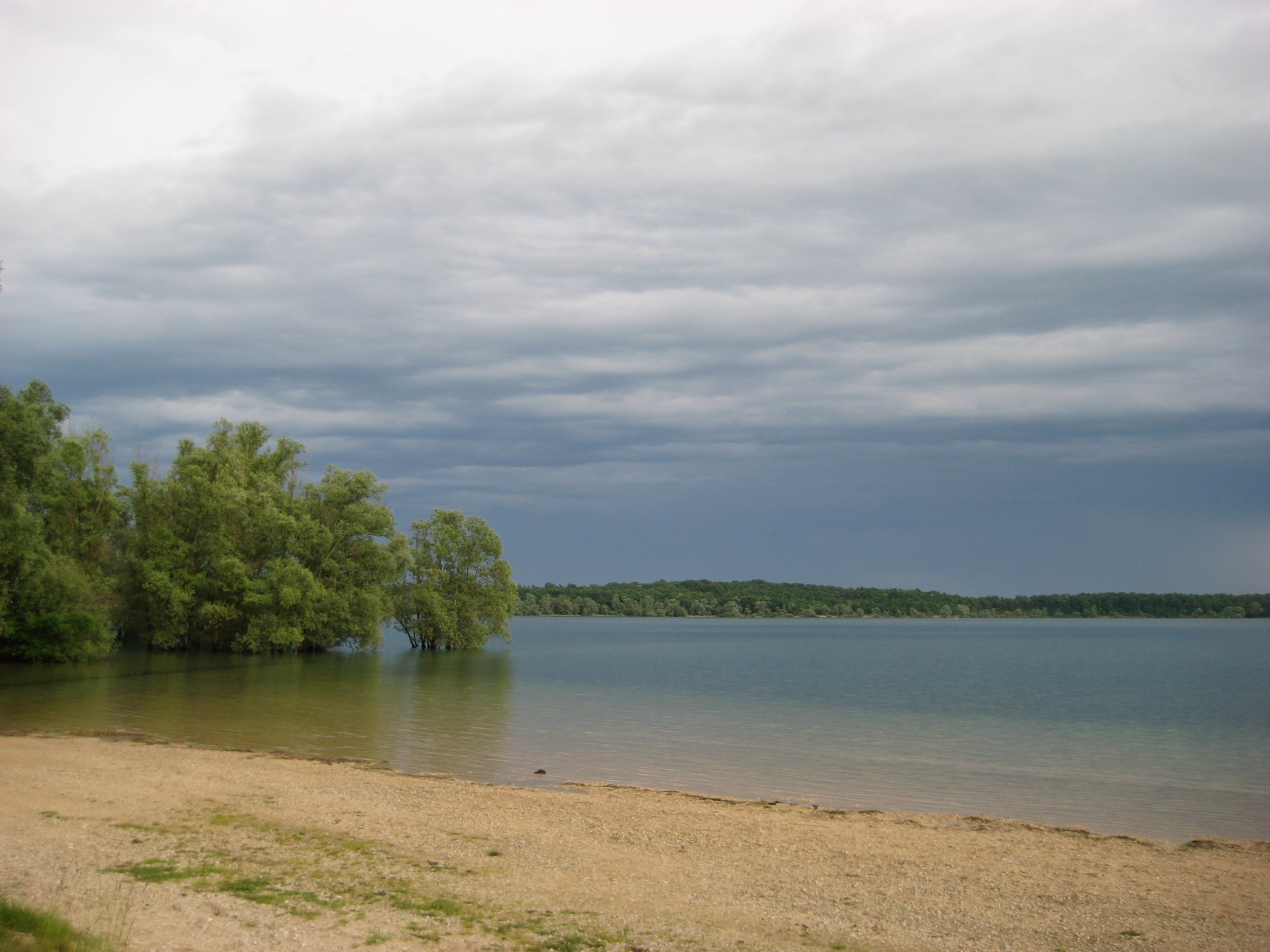 Lac de la foret d'Orient, Aube, France